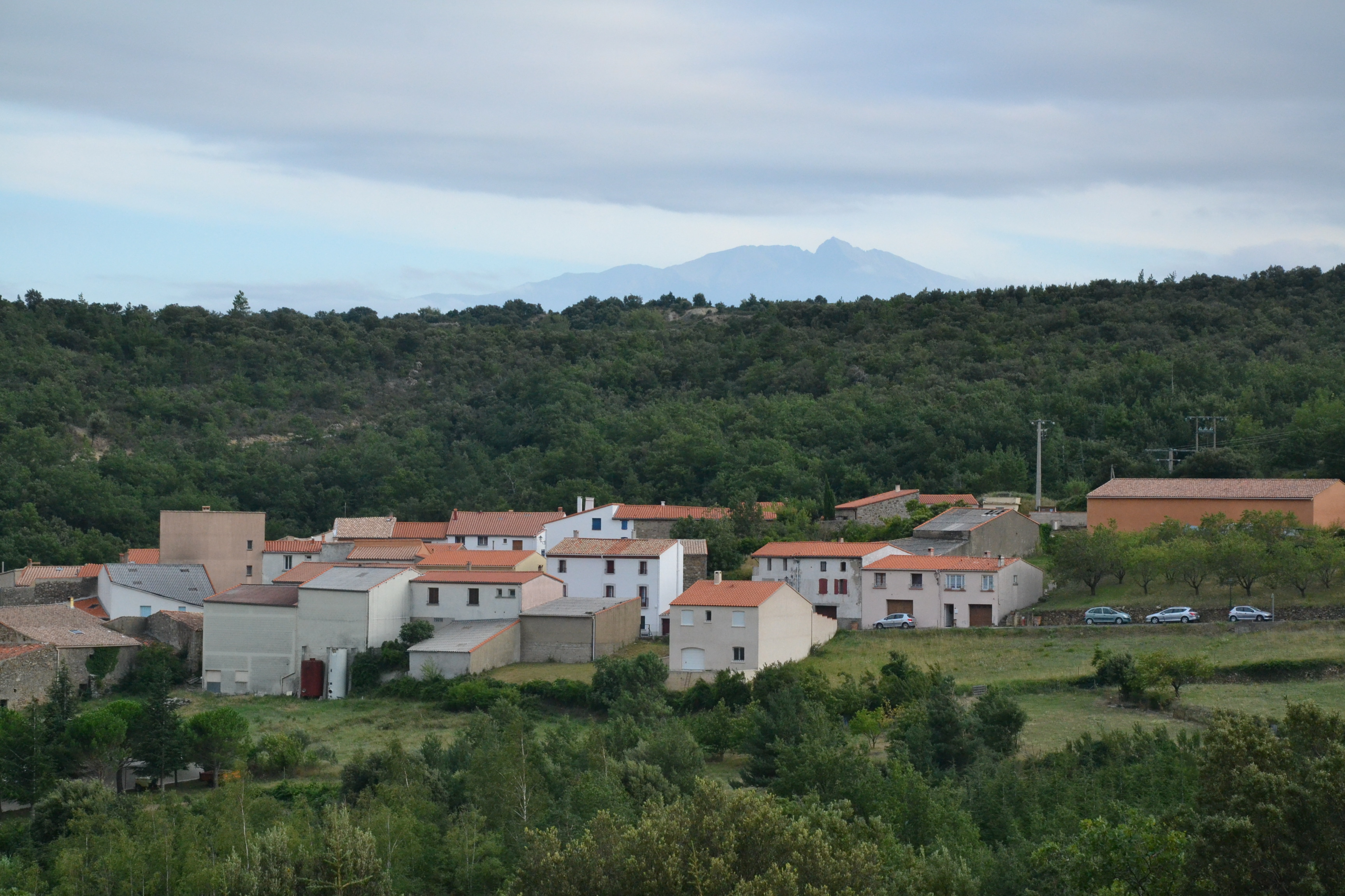 Saint-Martin et le Canigou en arrière-plan (P.-O., France)